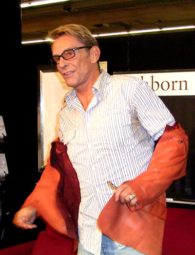 Wolfgang Joop, Buchmesse Frankfurt 2003